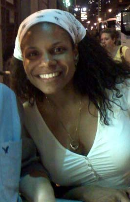 Audra McDonaldiMo